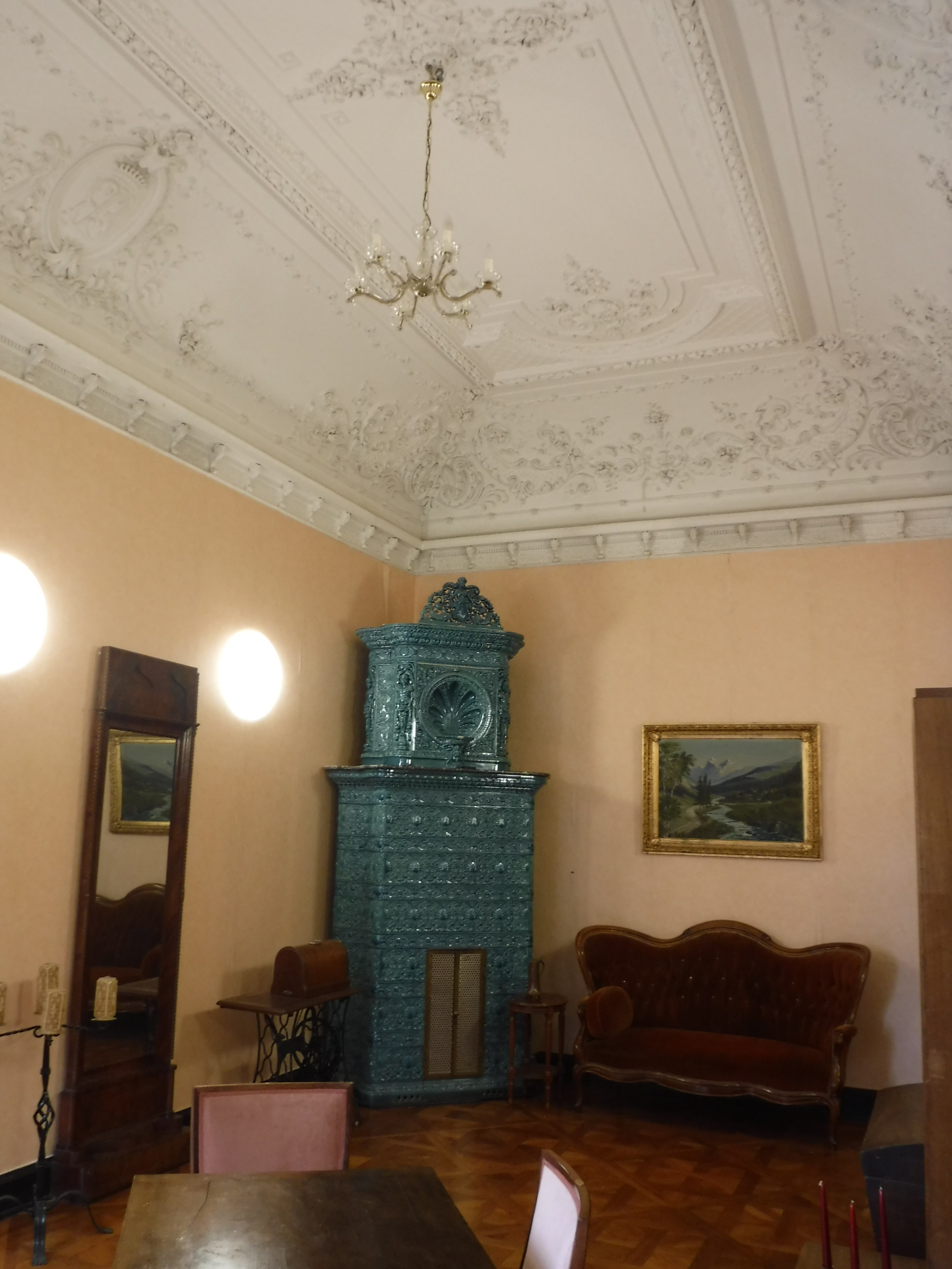 Schloss Seifersdorf, Tina-von-Brühl-Straße 33, 01454 Wachau. ID 09301961